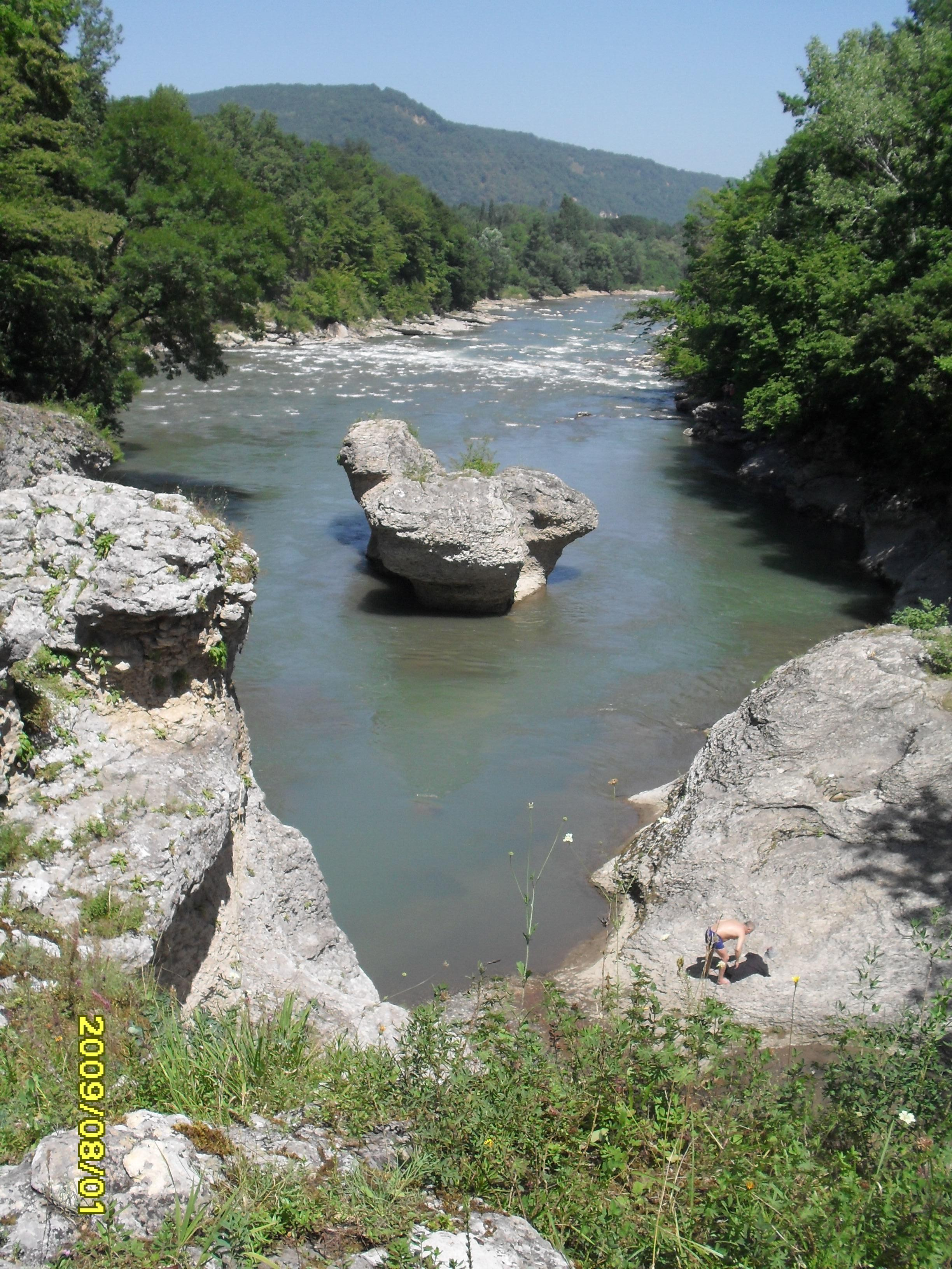 Камень на Белой реке.